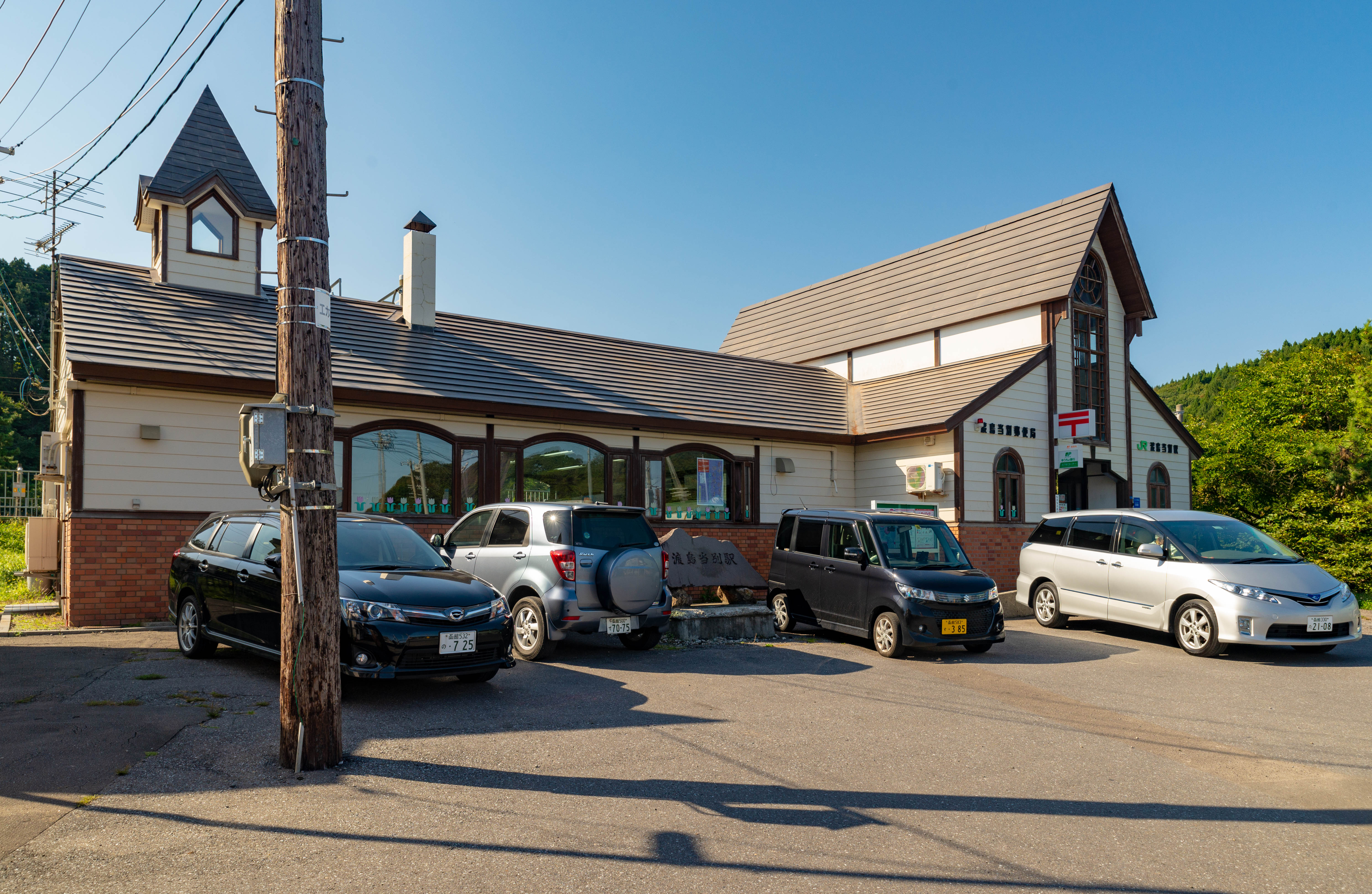 道南いさりび鉄道株式会社渡島当別駅駅舎 （北海道旅客鉄道株式会社江差線渡島当別駅駅舎）